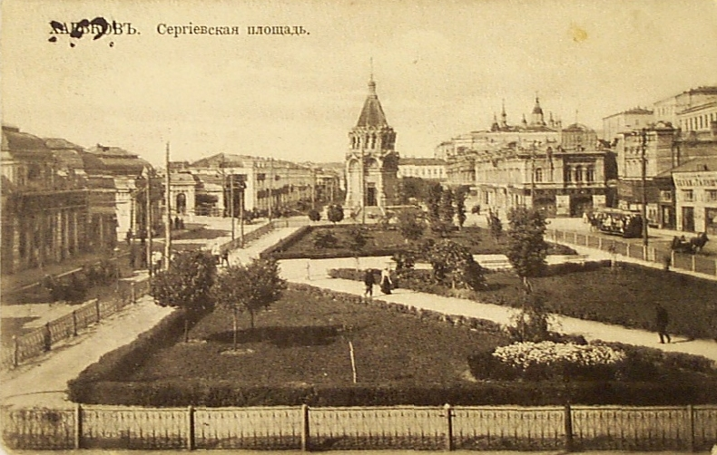 Вид на Сергиевскую площадь, с расположенной на ней Александровской часовней.